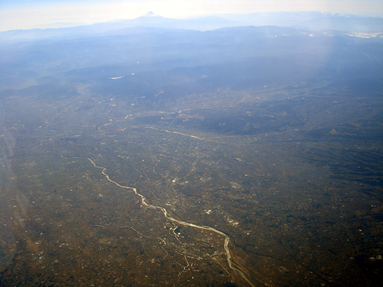 富士山とJR東日本群馬総社駅付近を蛇行する利根川、2007年2月4日投稿者撮影